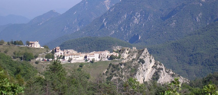 Vue d'ensemble du village du Mas (Alpes-Maritimes)